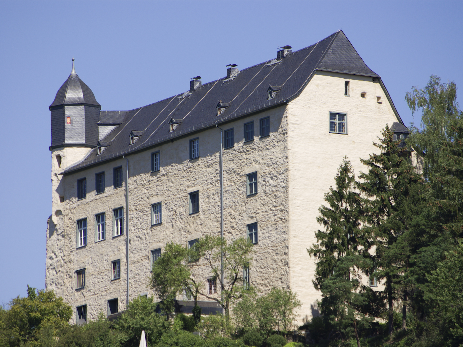 Burg Schadeck in Runkel.